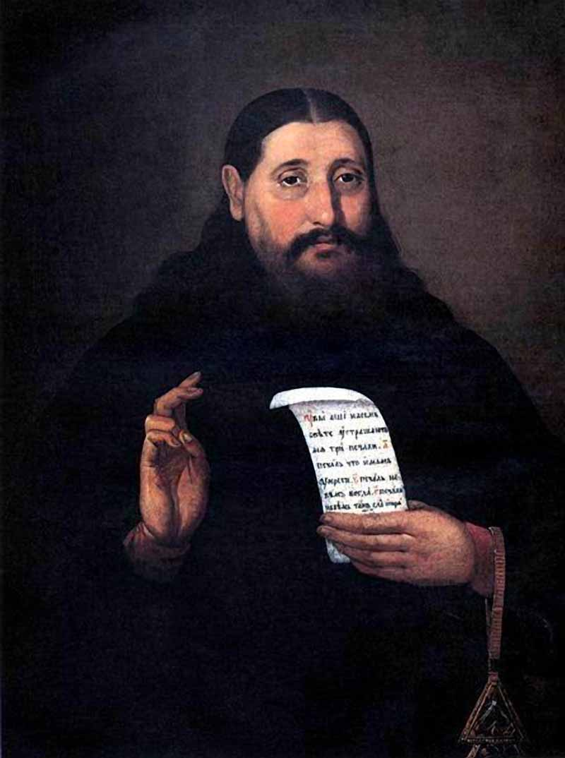 Мыльников Николай Дмитриевич «Портрет А.Баркова со свитком и лестовкой» 1826 Холст, масло. 74,5 х 61